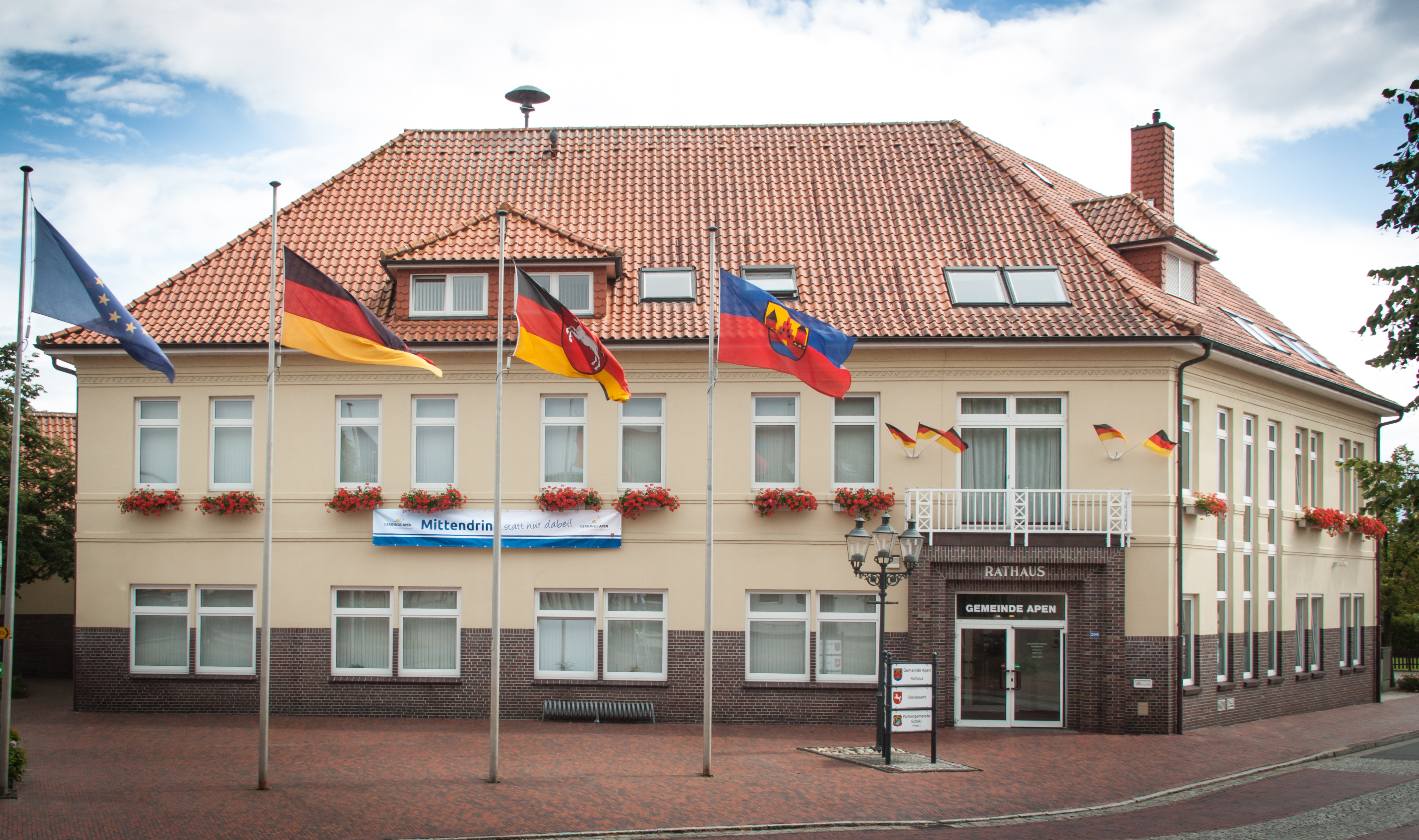 Das Rathaus der Gemeinde Apen mit gehissten Flaggen.